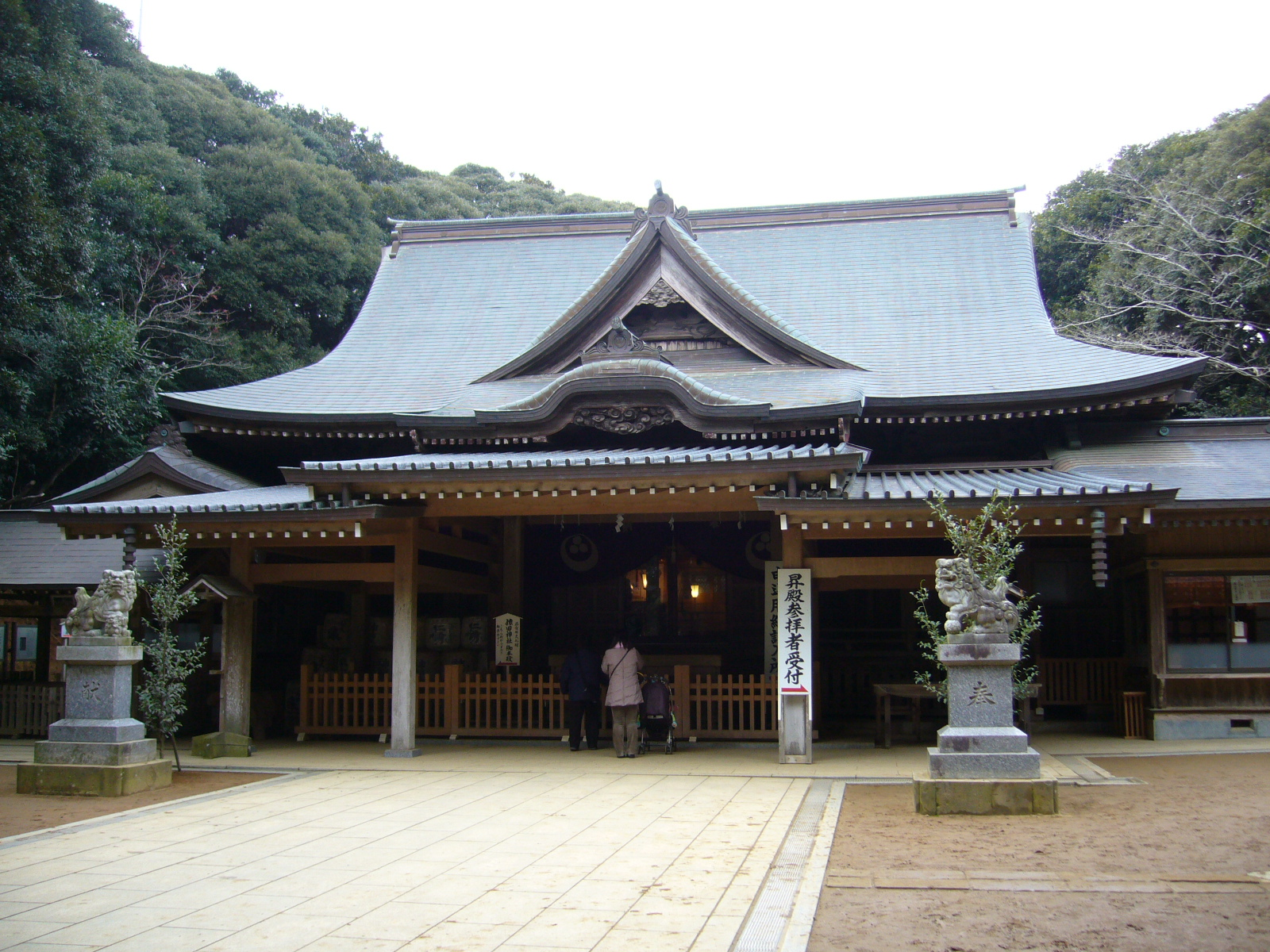 Saruda-jinjya-shrine,choshi-city,japan